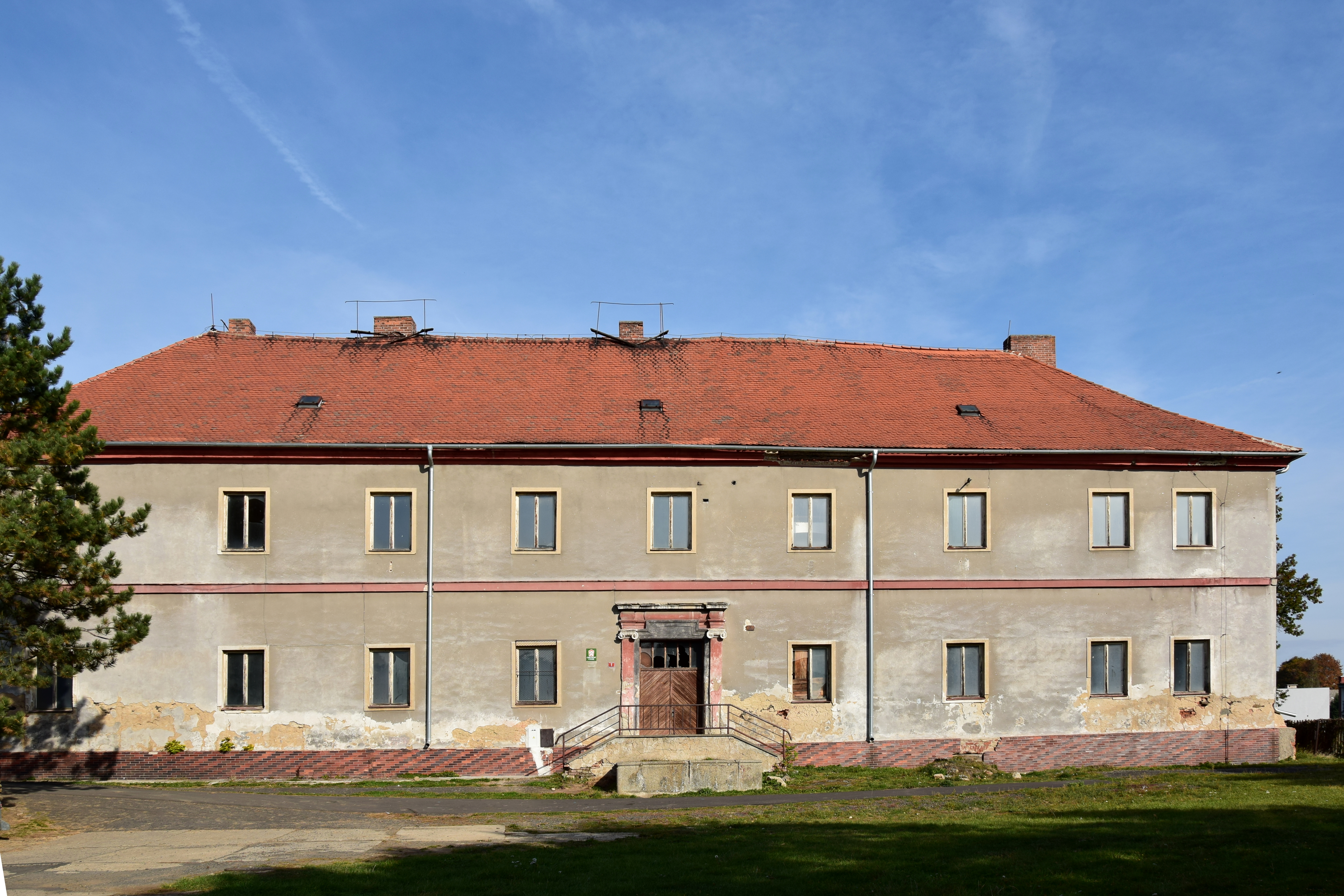 Chyše – průčelí bývalého karmelitánského kláštera